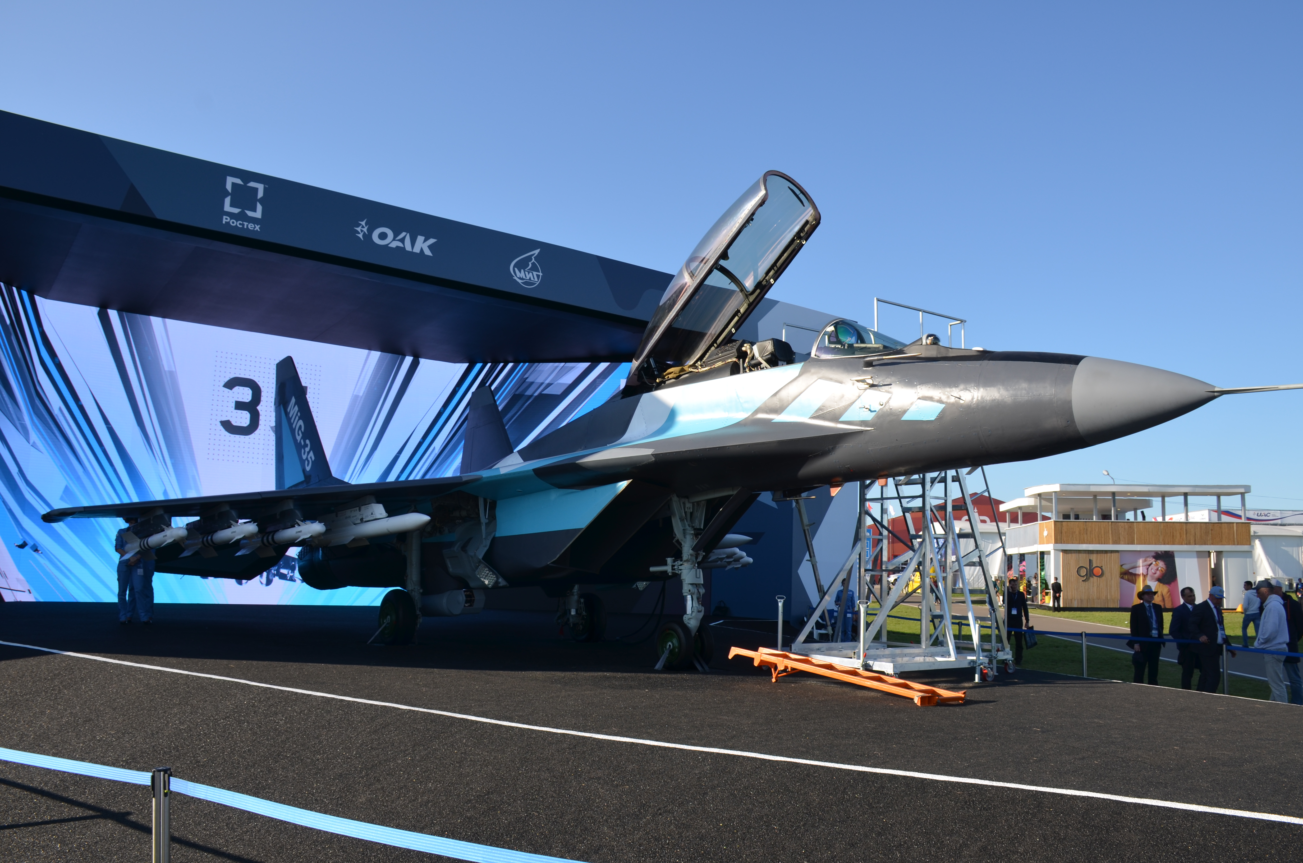 Прототип МиГ-35 на авиасалоне МАКС-2019. Премьера "экспортной модификации".